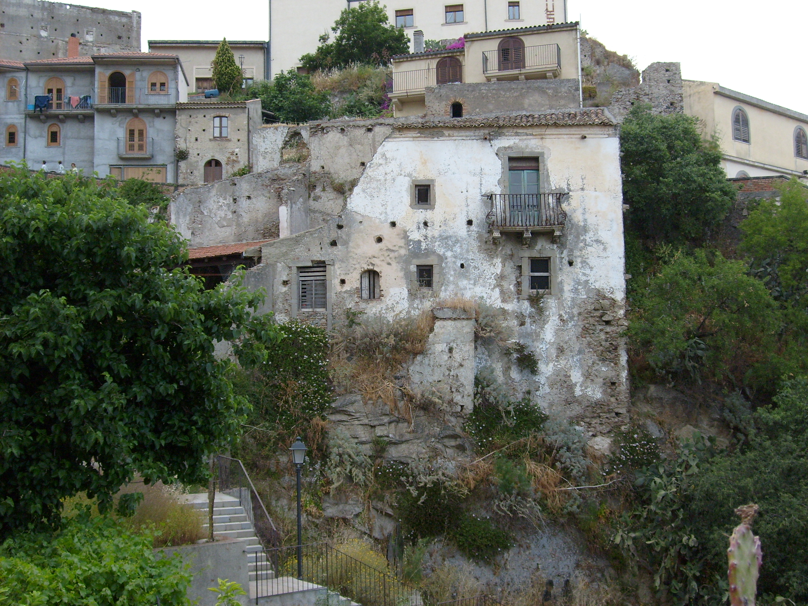 Il Palazzo Scarcella